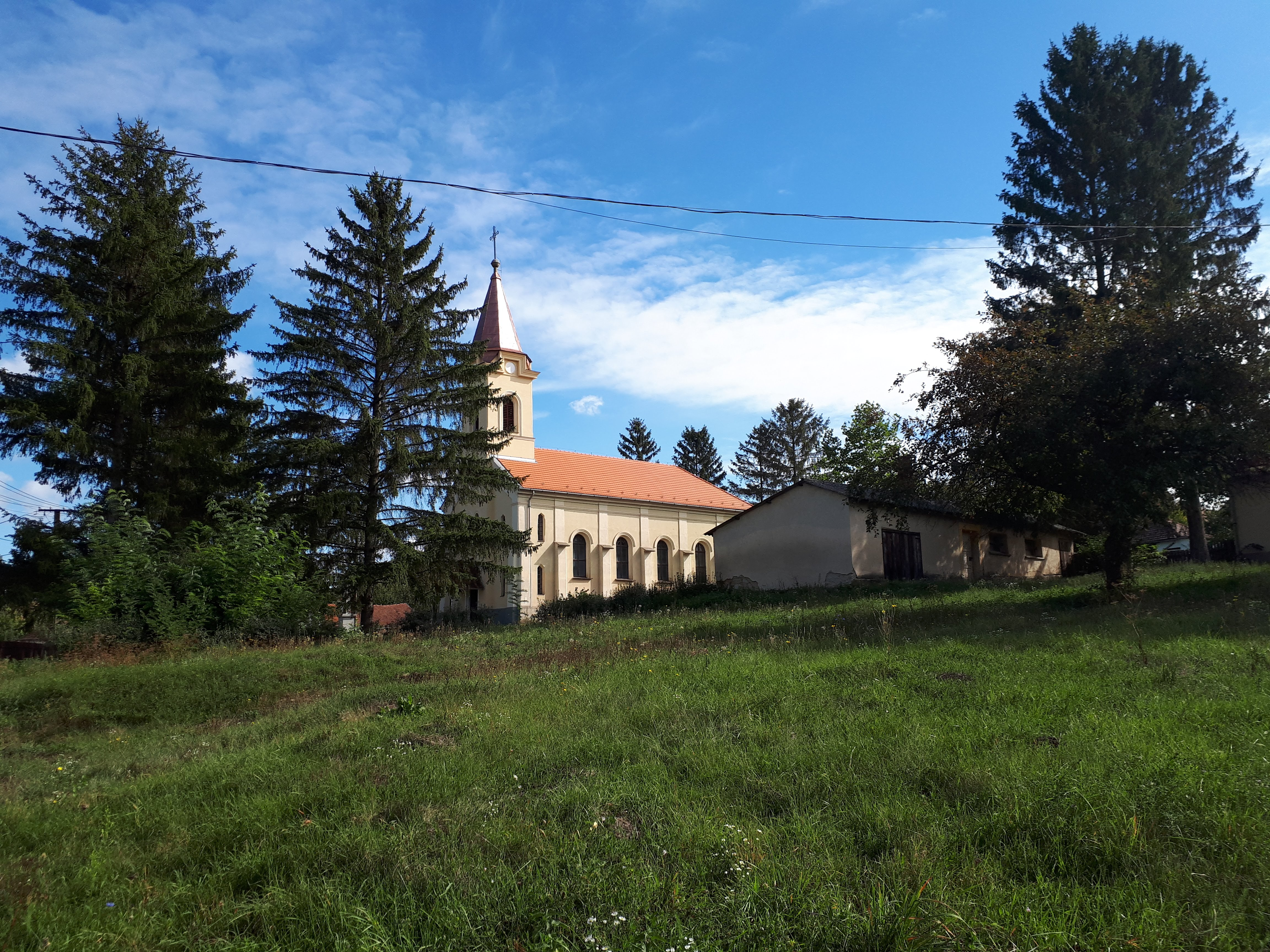 Hangács Szent Adalbertről elnevezett római katolikus temploma